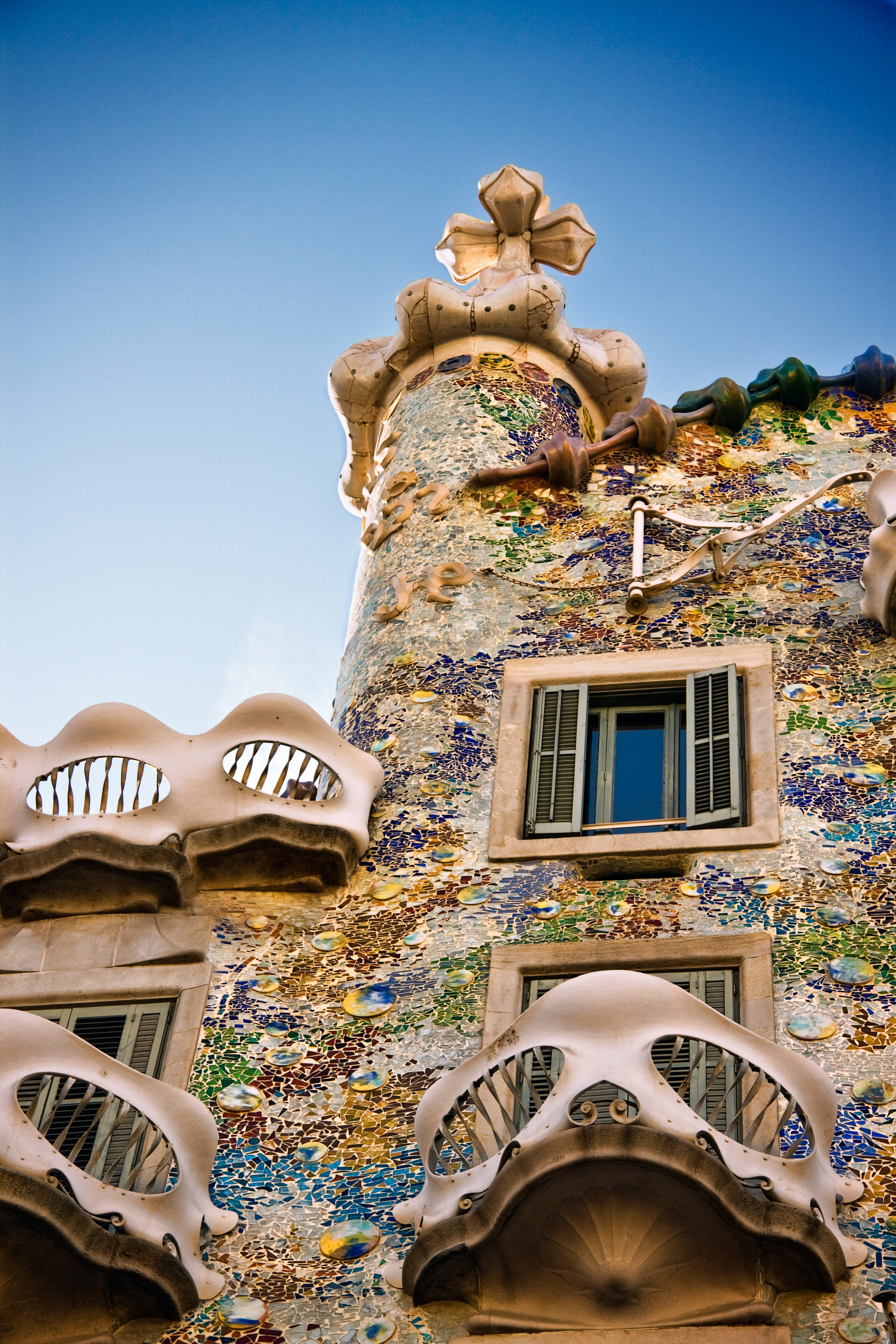 Casa Batlló de Barcelona